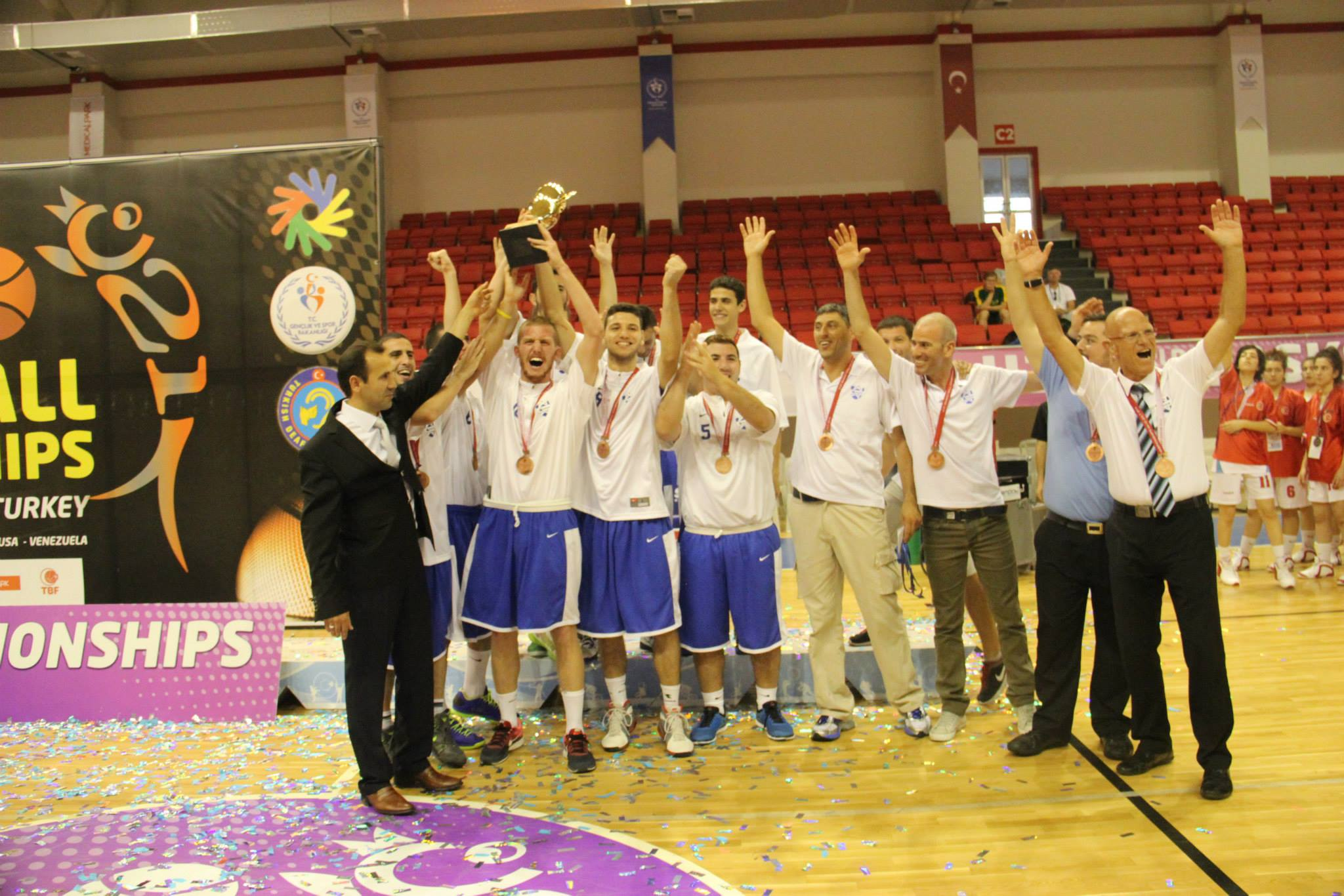 מדלית ארד אליפות עולם כדורסל עתודה 2014 בטורקיה לאחר נצחון דרמטי על ליטא.